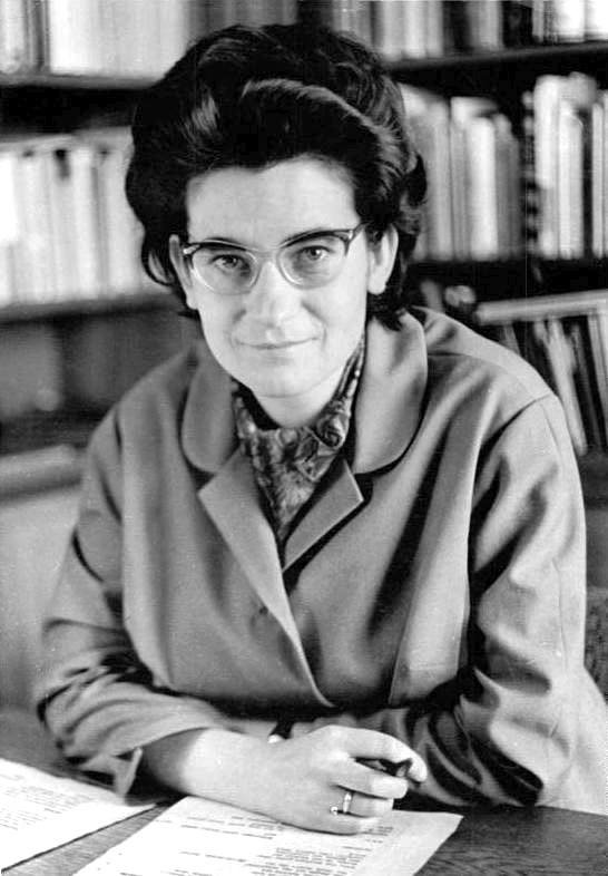 Zentralbild Eckleben 9.5.1963 Zum Tag des Buches - Schriftstellerin Christa Wolf Christa Wolf begann nach ihrem Germanistik-Studium als Literaturkritikerin, als Lektorin und Mitarbeiterin im Deutschen Schriftstellerverband. Als erste belletristische Arbeit, erschien 1961 die "Moskauer Novelle", die sogleich ungewöhnliche Beachtung fand. Ihre neue Erzählung "Der geteilte Himmel", die im Mai erscheinen wird, steht zur Diskussion für den FDGB-Literaturpreis 1962-1963. Gegenwärtig arbeitet Christa Wolf an einem Filmdrehbuch für ihre Erzählung, "Der geteilte Himmel". UBz: Schriftstellerin Christa Wolf